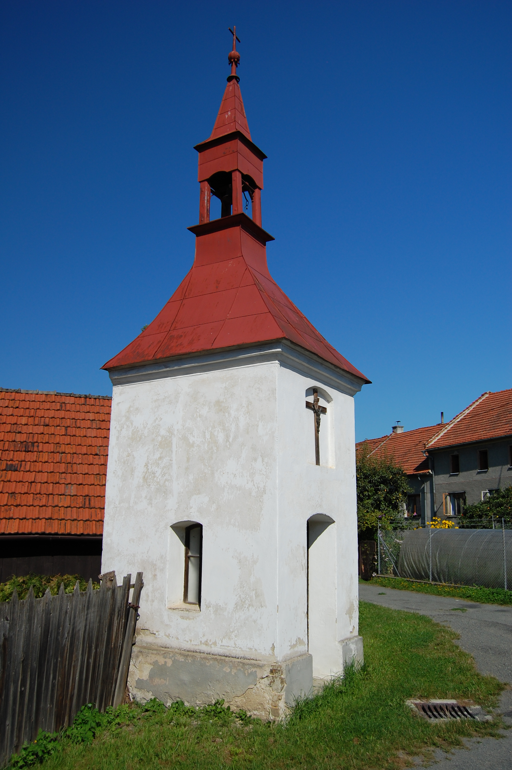 Zvonice na návsi, Křemenec, okres Prostějov